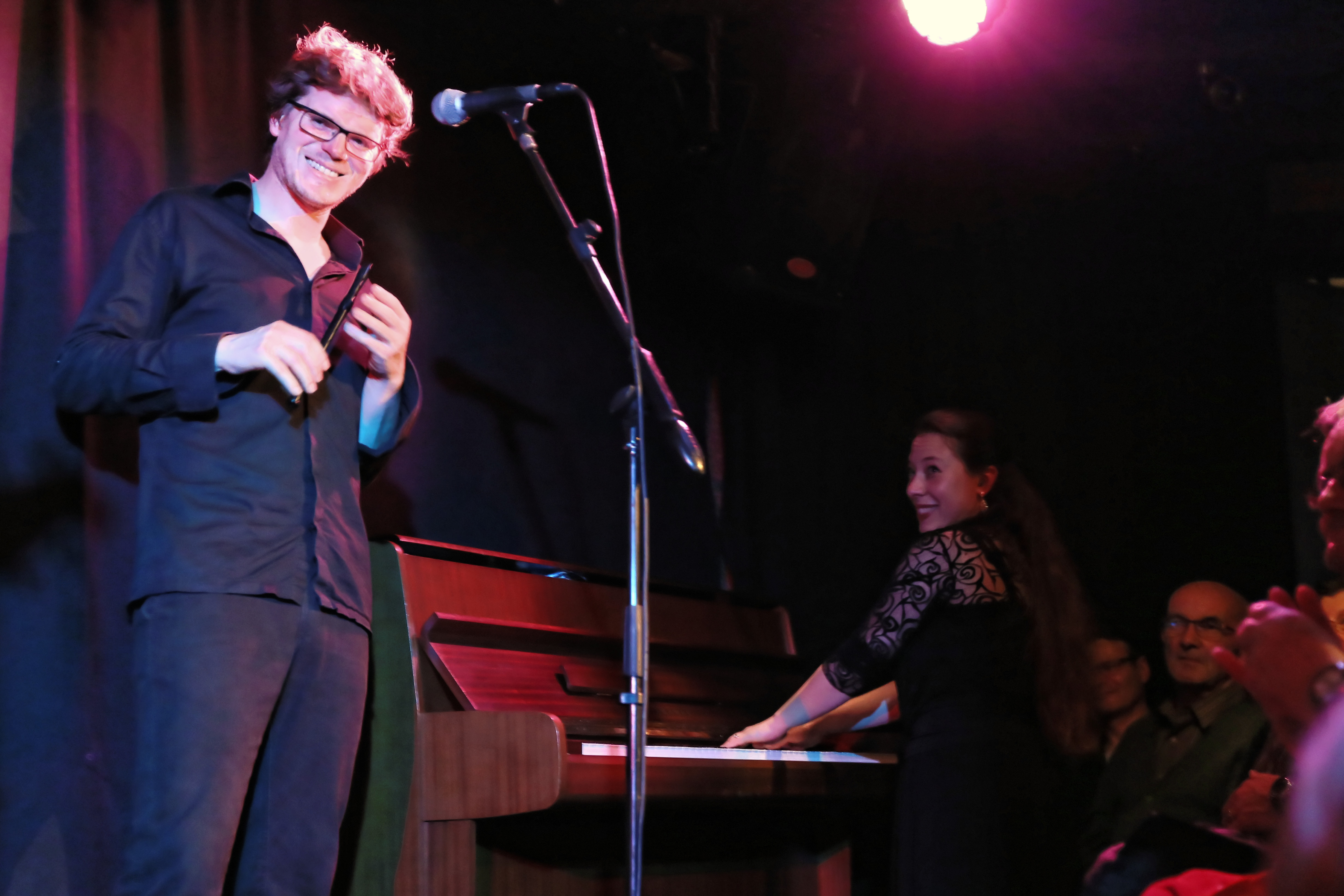 Ludovic Berrou avec Gérard Jaffrès au Trousse Chemise à Langan le 20 novembre 2015.